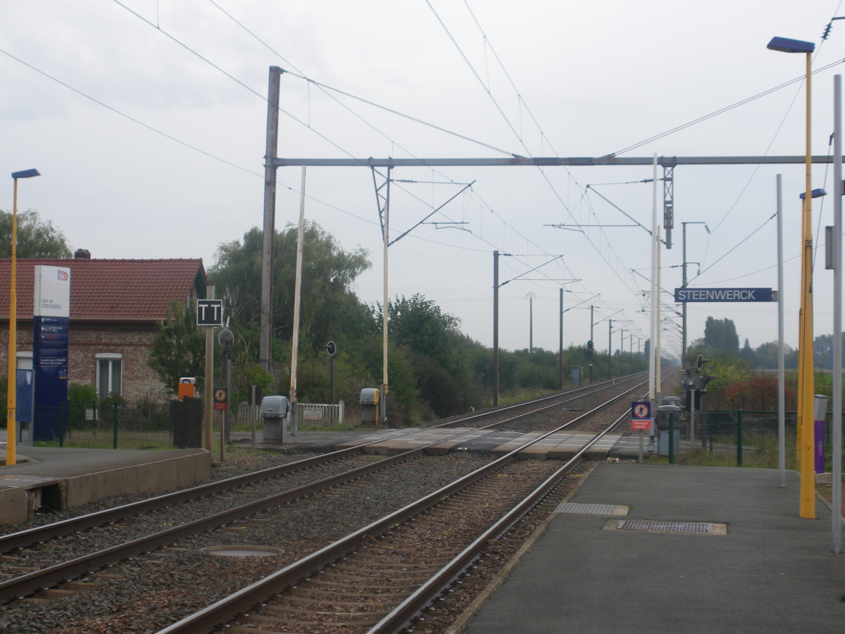 Vue de la gare de Steenwerck.